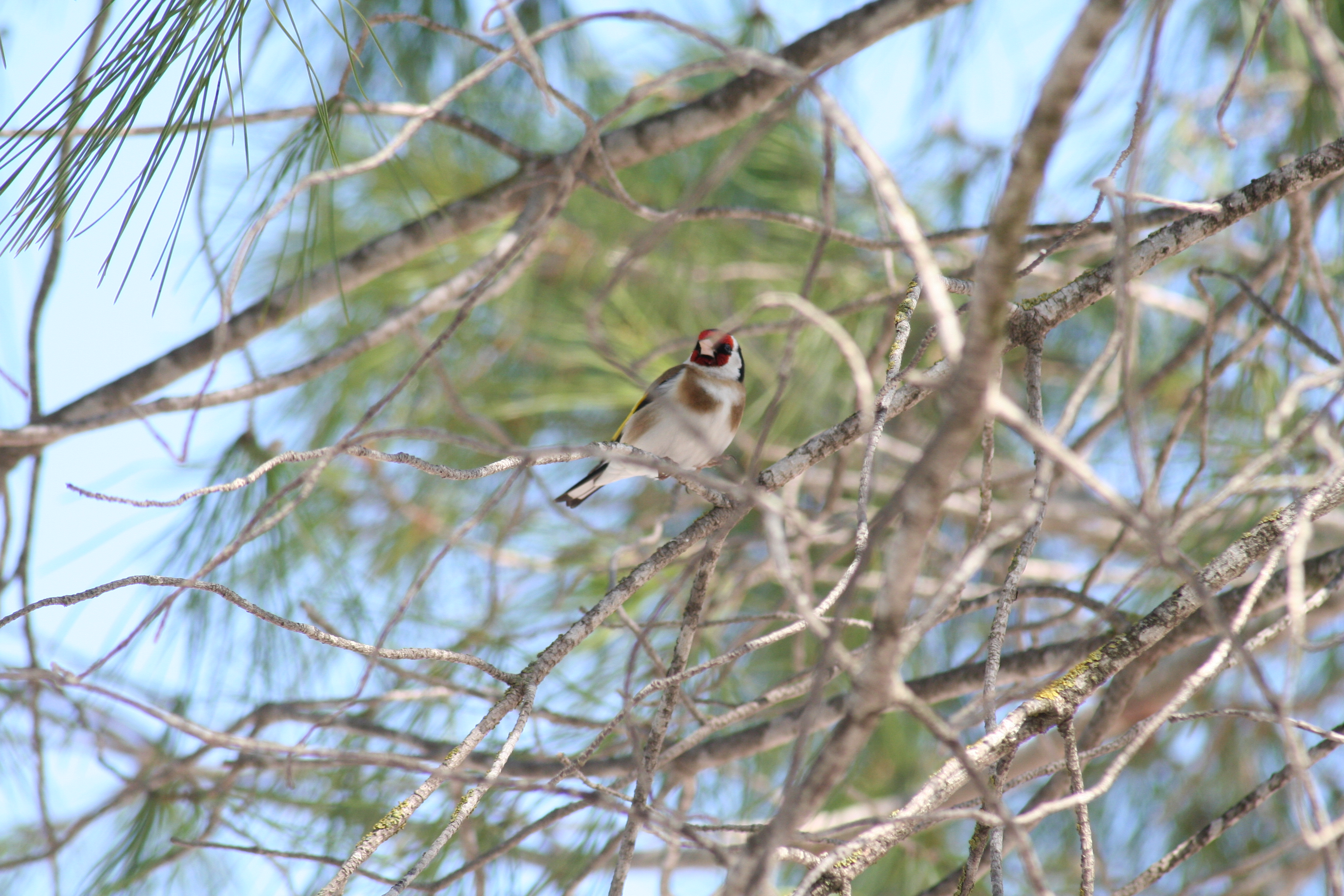 Jilguero (Carduelis carduelis) posado en el interior de un pino en el municipio toledano de Las Herencias, España.